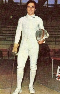 Lo schermidore Rolando Rigoli